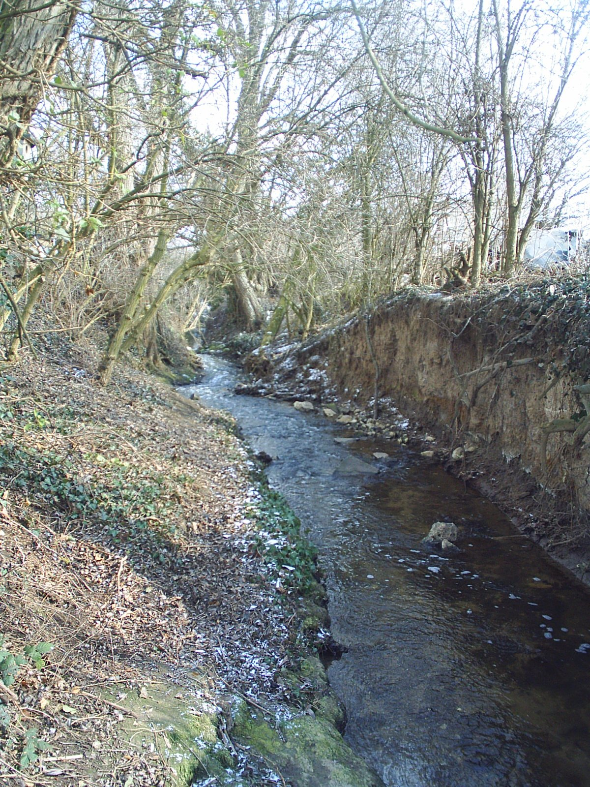 Floßbach/Landgraben zu Dirmstein